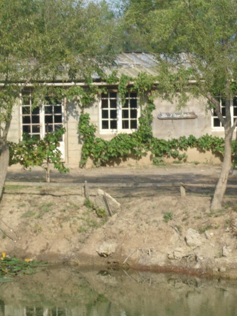 Association de pêche "La Paychelo" - Névian (Aude)